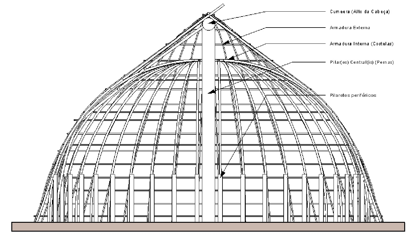 Imagem produzida no Autodesk Revit